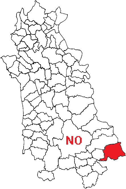 Mappa con posizione del comune nella provincia italiana di Novara